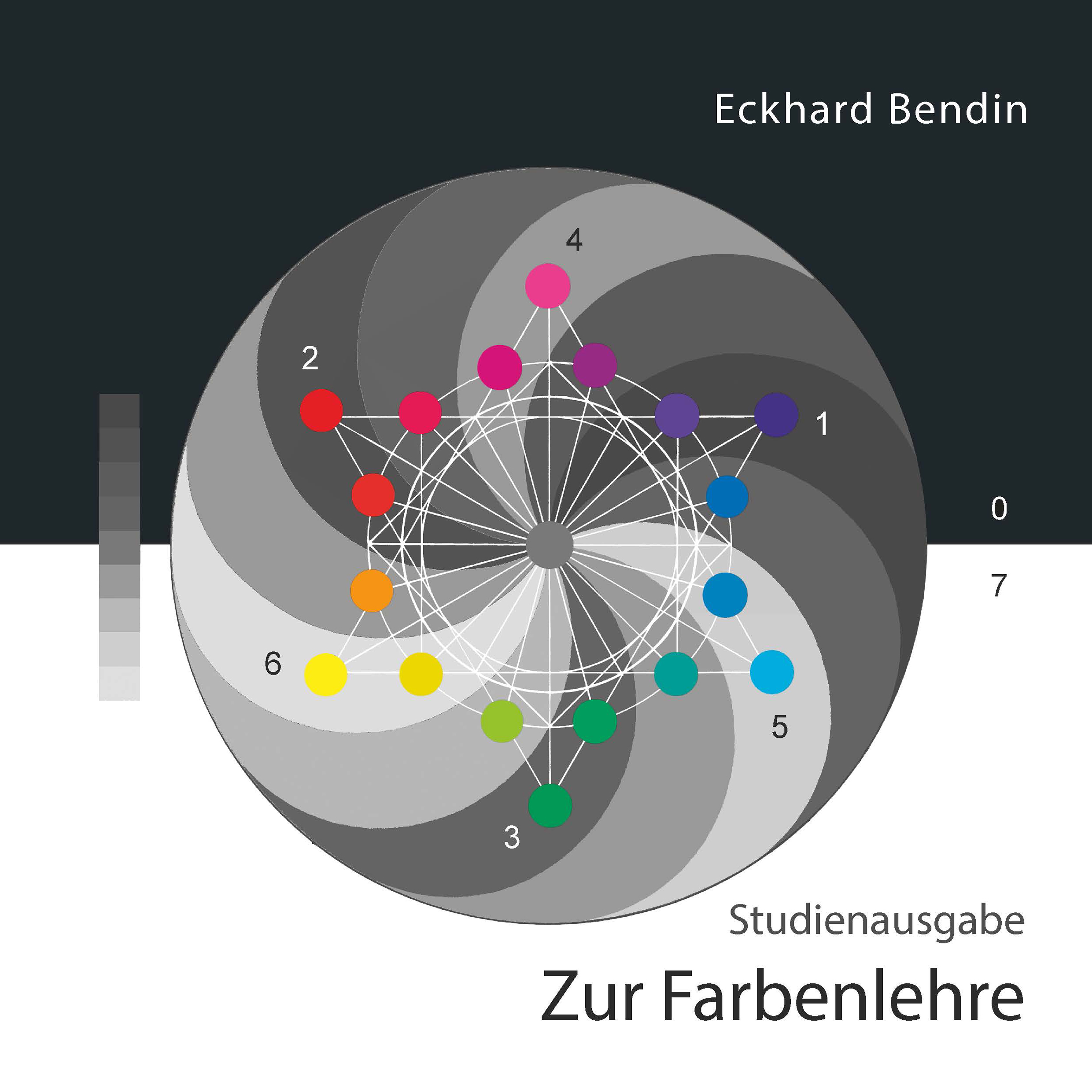 Titel der Studienausgabe 2014 der Anthologie 'Zur Farbenlehre', edition bendin Dresden 2014